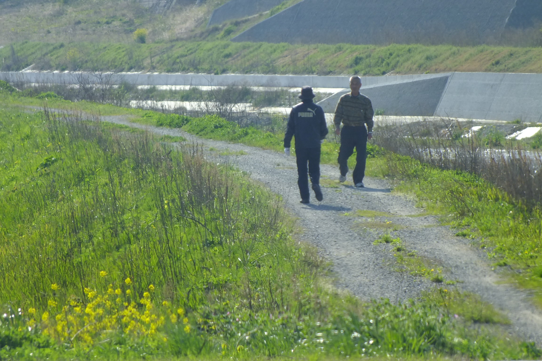 Noma-gawa 兵庫県西脇市・野間川春のすれ違い